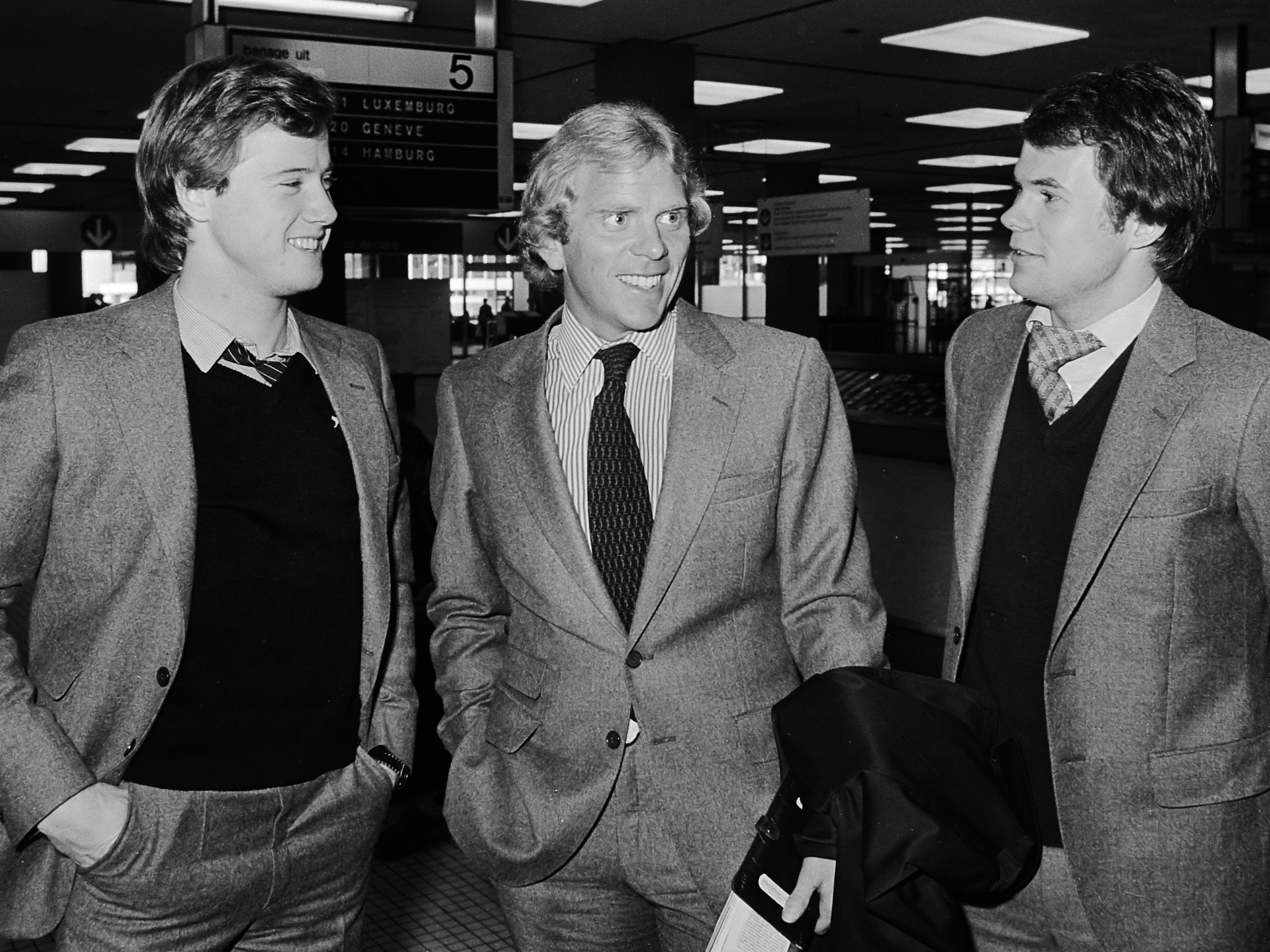 Voetbalclub Malmö FF arriveert op Schiphol voor de voetbalwedstrijd in het kader van de Europacup tegen Feijenoord. V.l.n.r. Ingemar Erlandson , trainer Bob Houghton en Magnus Andersson op Schiphol 23 oktober 1979